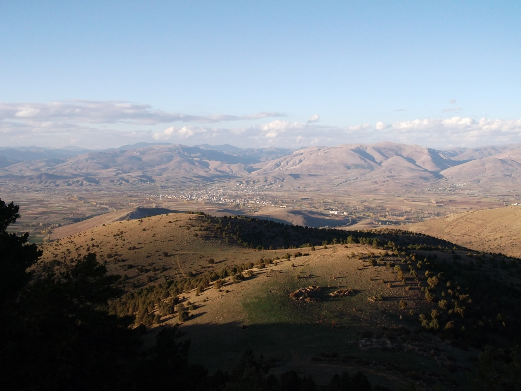 Zirveden Kelkit...